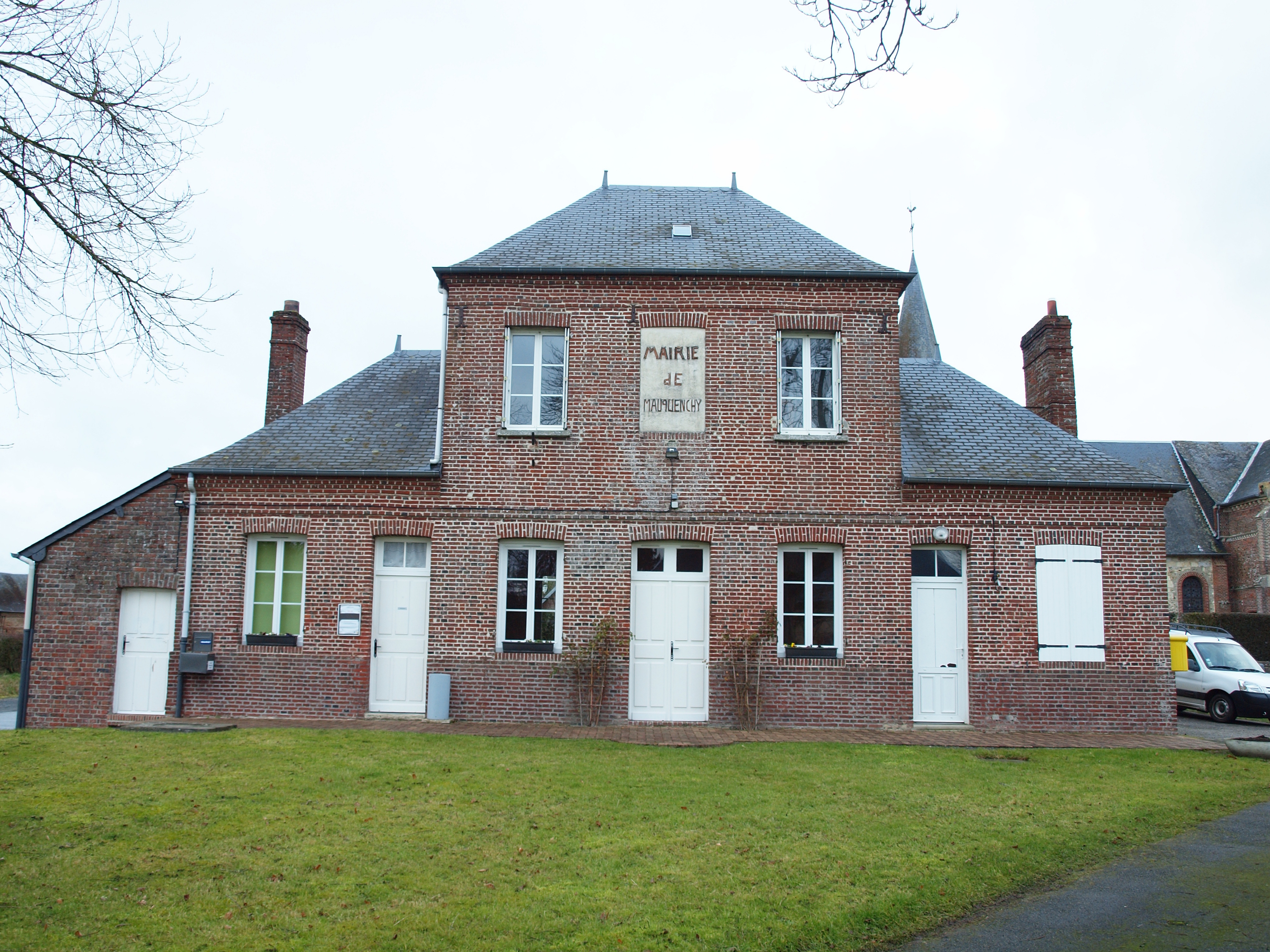 Mauquenchy (Seine-Maritime, France)